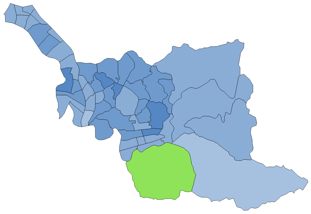 中文（台灣）: 顏色對照表